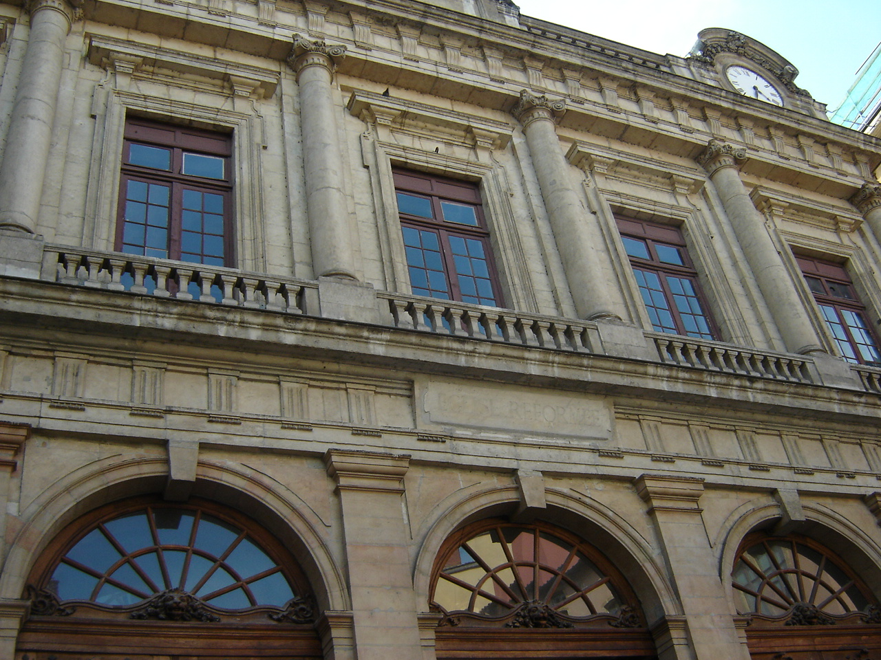 Façade du Temple du Change, place du Change, à Lyon (vue partielle).